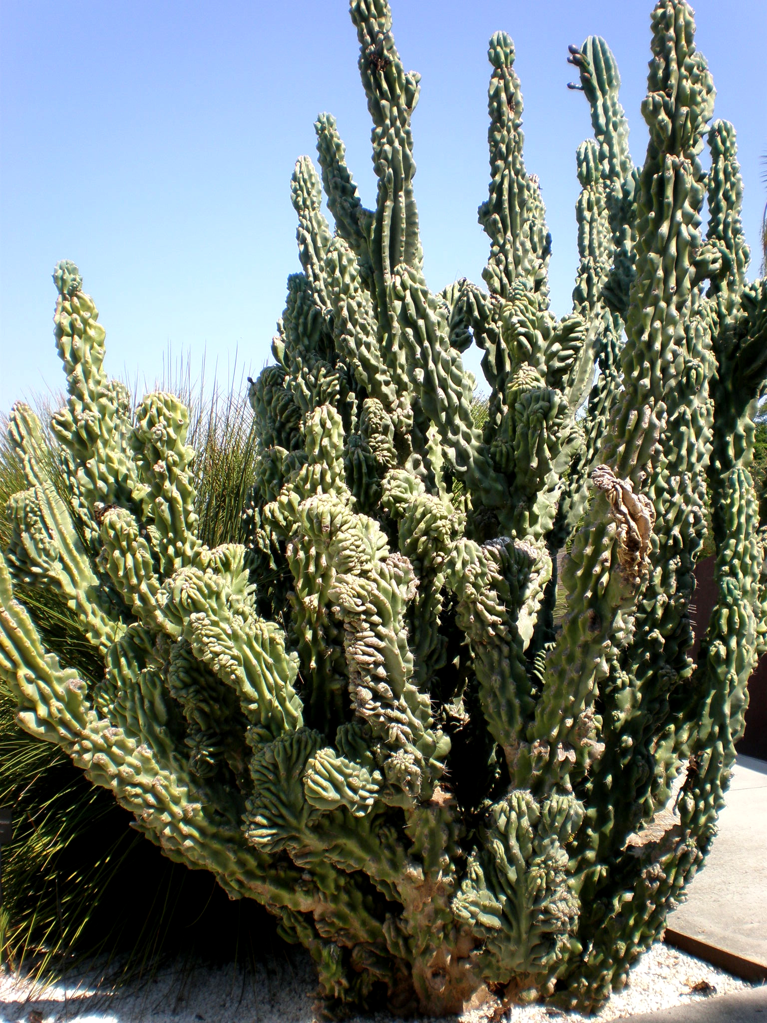 Jardín Botánico de Barcelona.